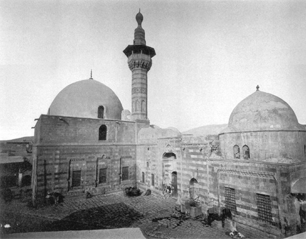 جامع مراد باشا النقشبندي نونفيلس 1880